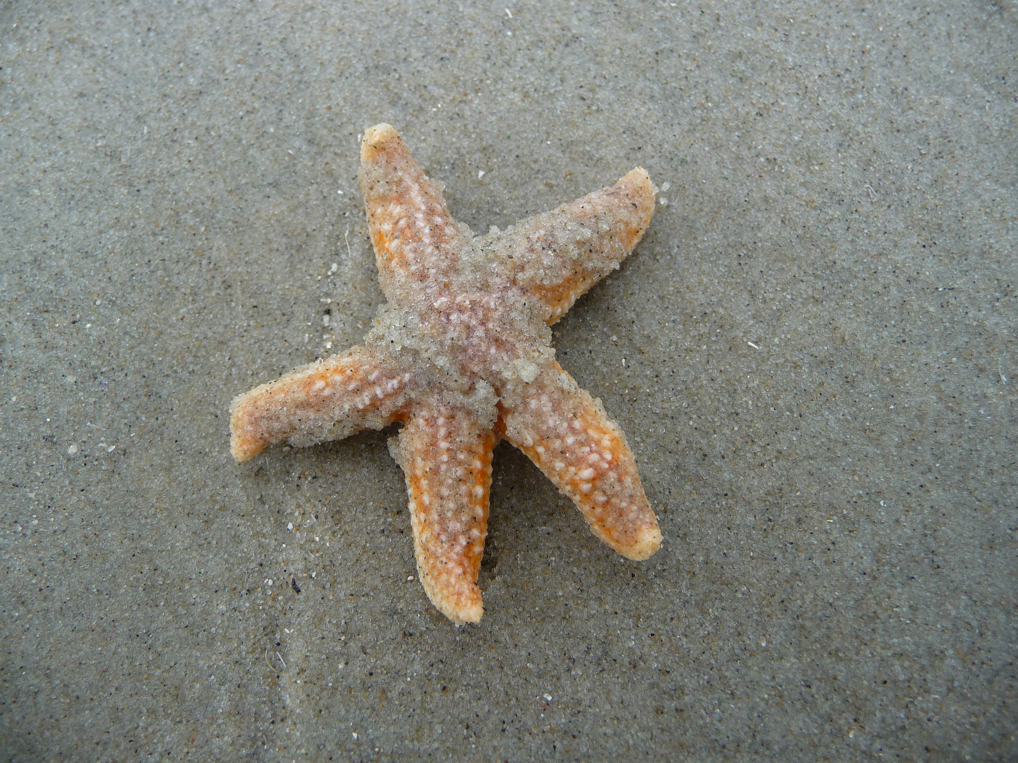 Gemeiner Seestern (Asterias rubens), Größe: circa 7 Zentimeter, gefunden im Spülsaum der Insel Juist (Niedersächsisches Wattenmeer, Deutschland)